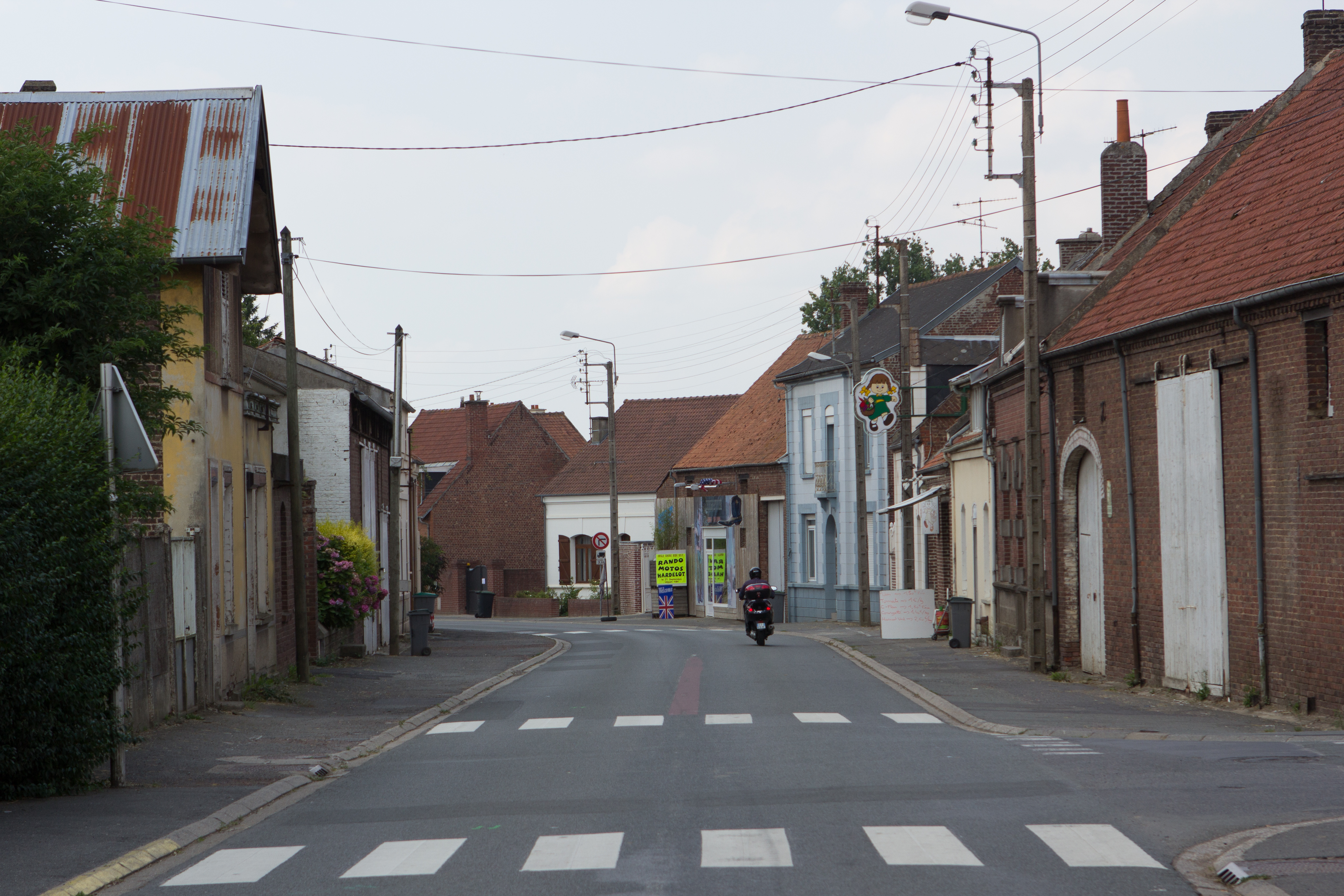 Vue de Neuville-Saint-Vaast / Neuville-Saint-Vaast, Pas-de-Calais, France